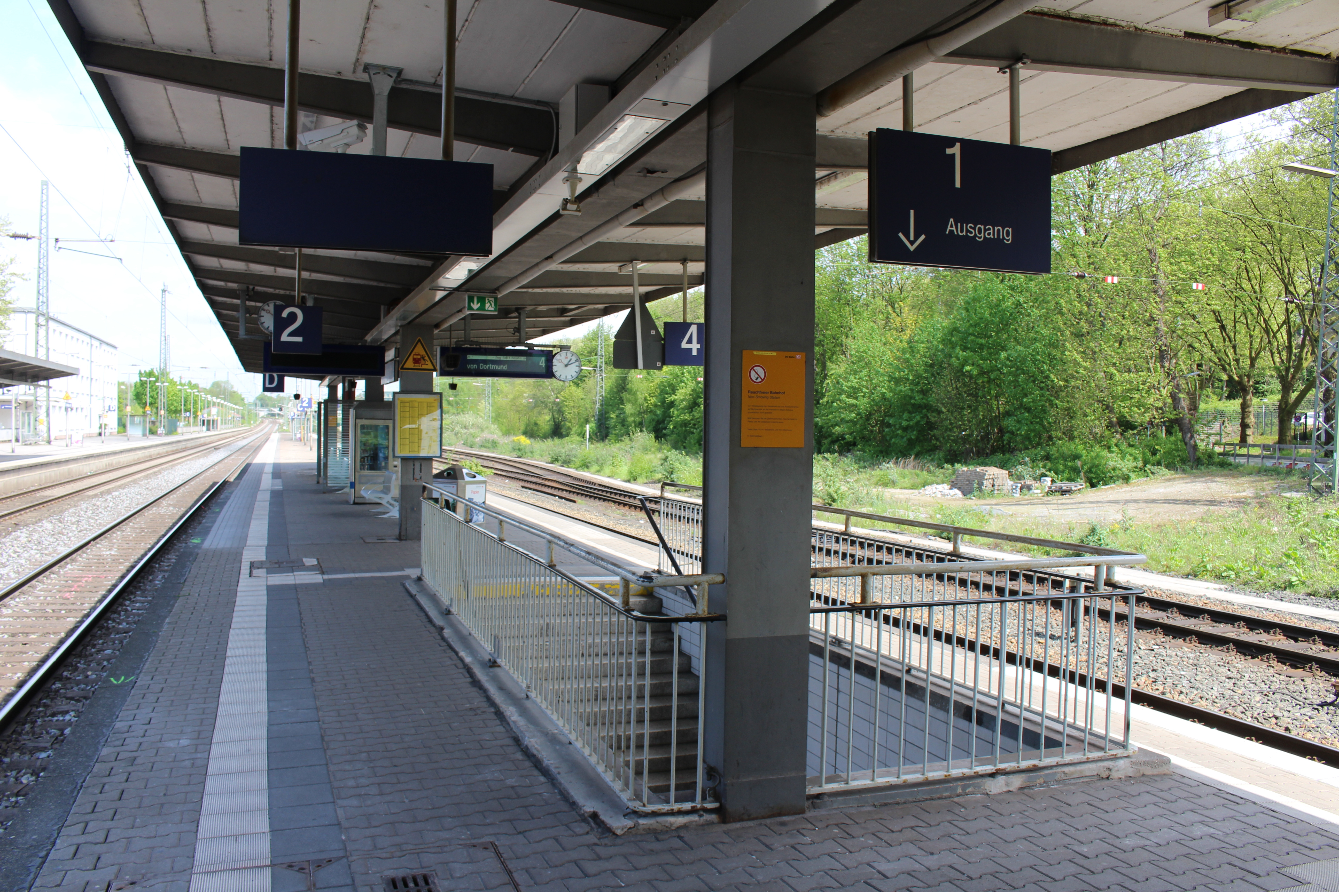 Blick auf Hauptbahnhof Recklinghausen, Gleis 2 und 4 (mit Treppenaufgang und dynamischen Anzeigetafeln)